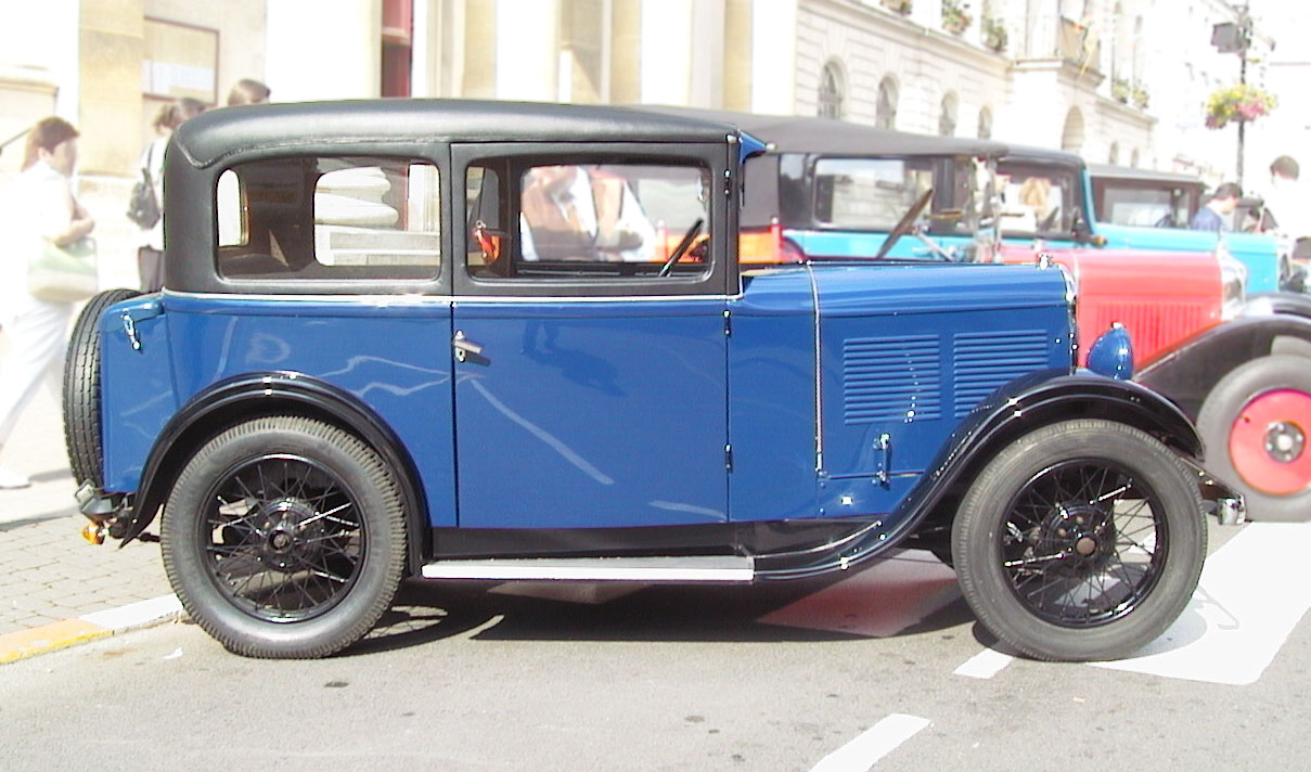 Rosengart LR2 - 1929 Expo 2004 - personal picture